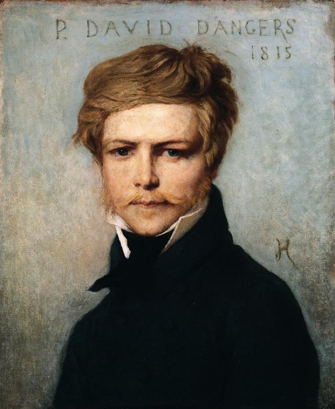 David d'Angers (1789-1856), French sculptor